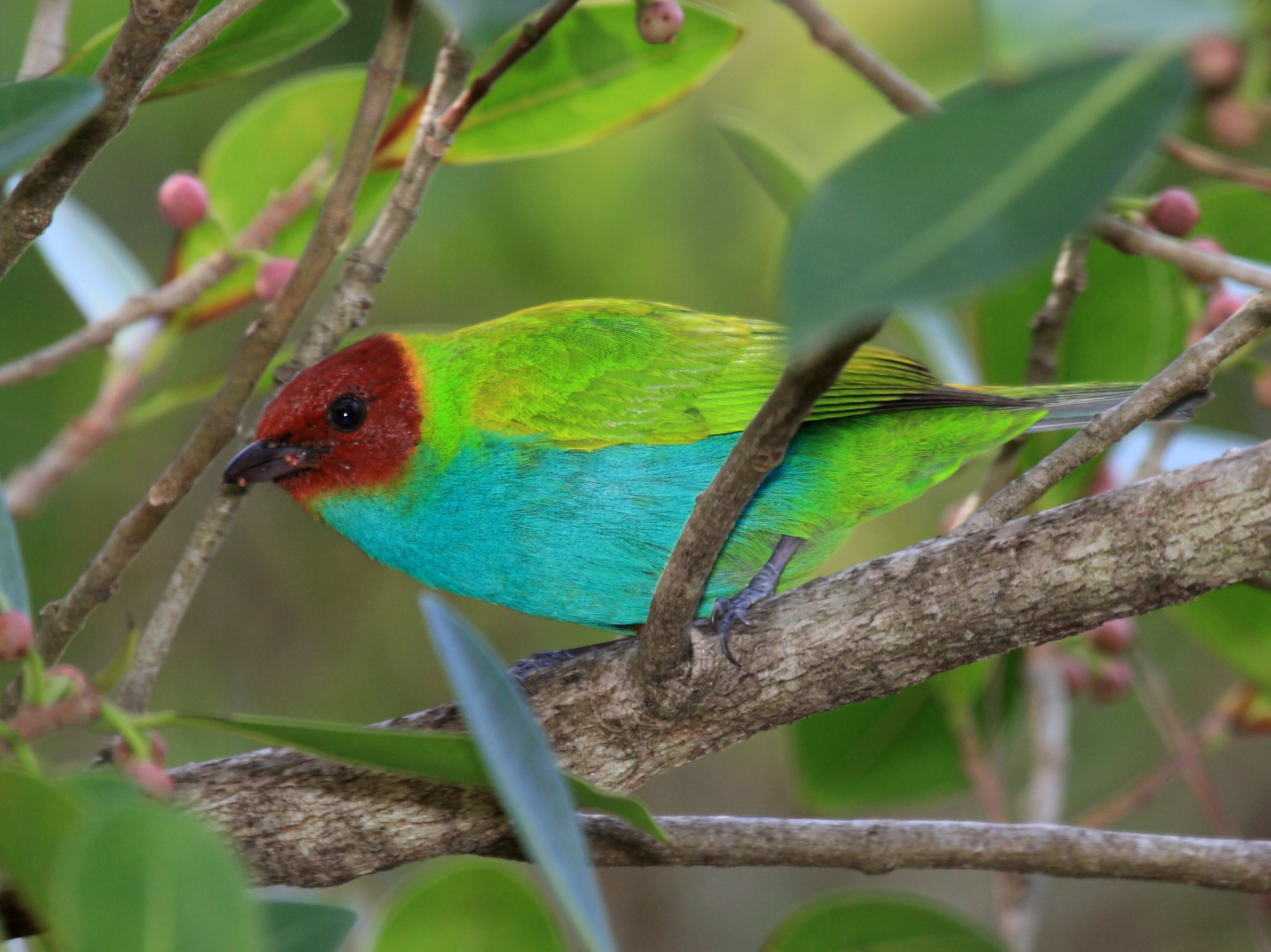 Bay-headed Tanager (Tangara gyrola). Taken in Panama.